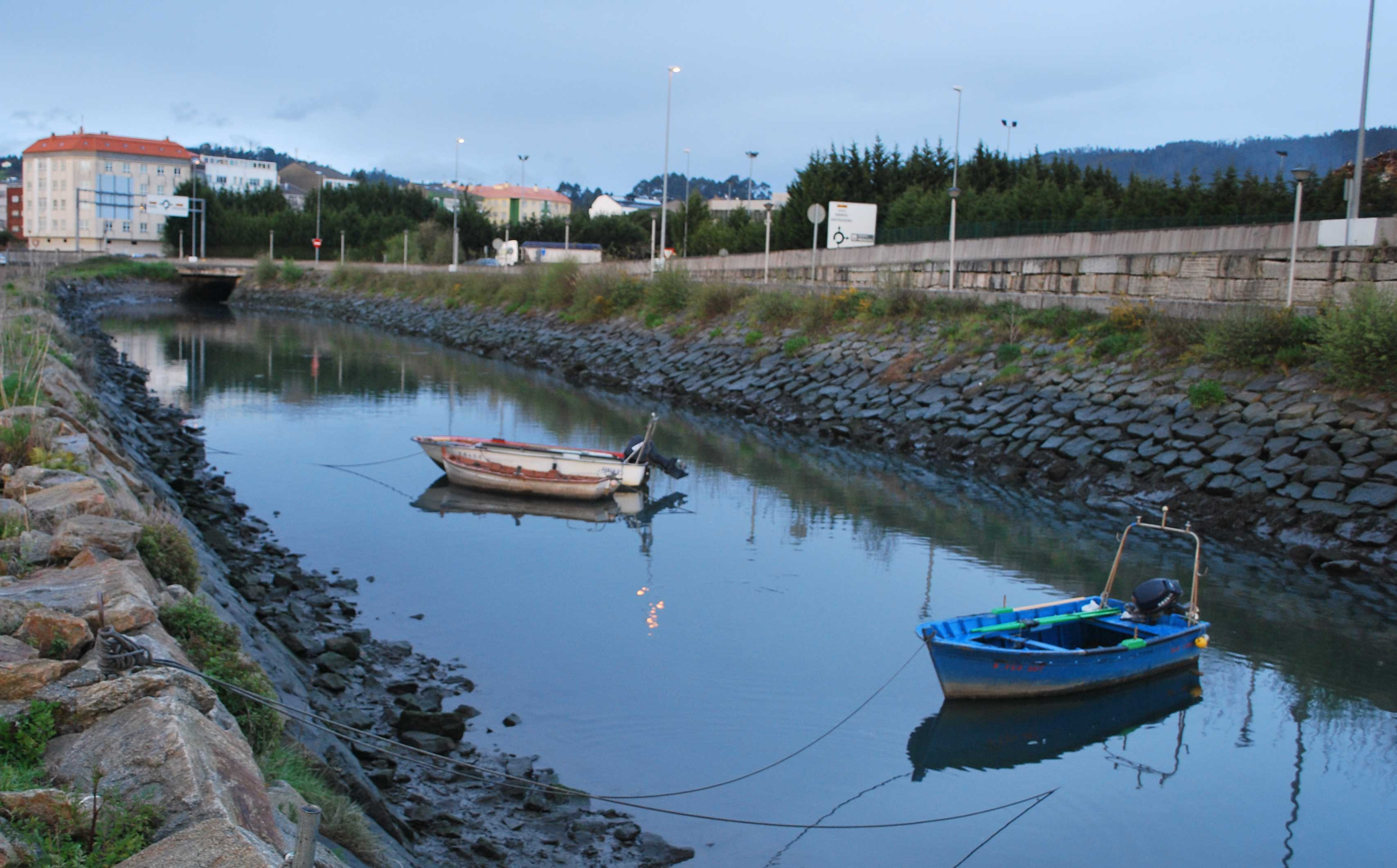 Desenbocadura do río Salgueiro na ría de Xuvia